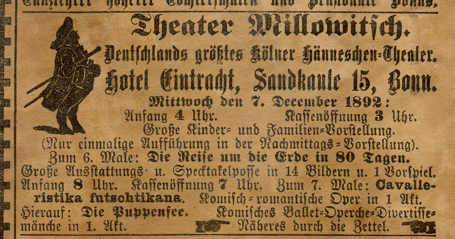 Zeitungsannonce des Millowitsch-Theaters von 1892